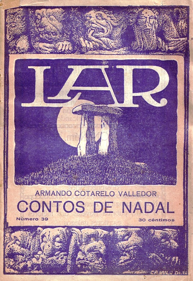 39 Contos de Nadal. Amando Cotarelo Valledor. Lar. 1927.jpg